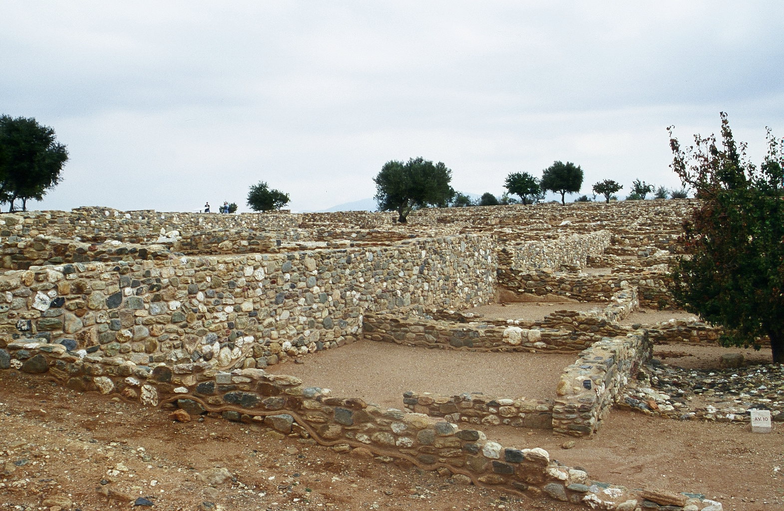 Blick von Südost nach Nordwest über den Nordhügel in Olynth